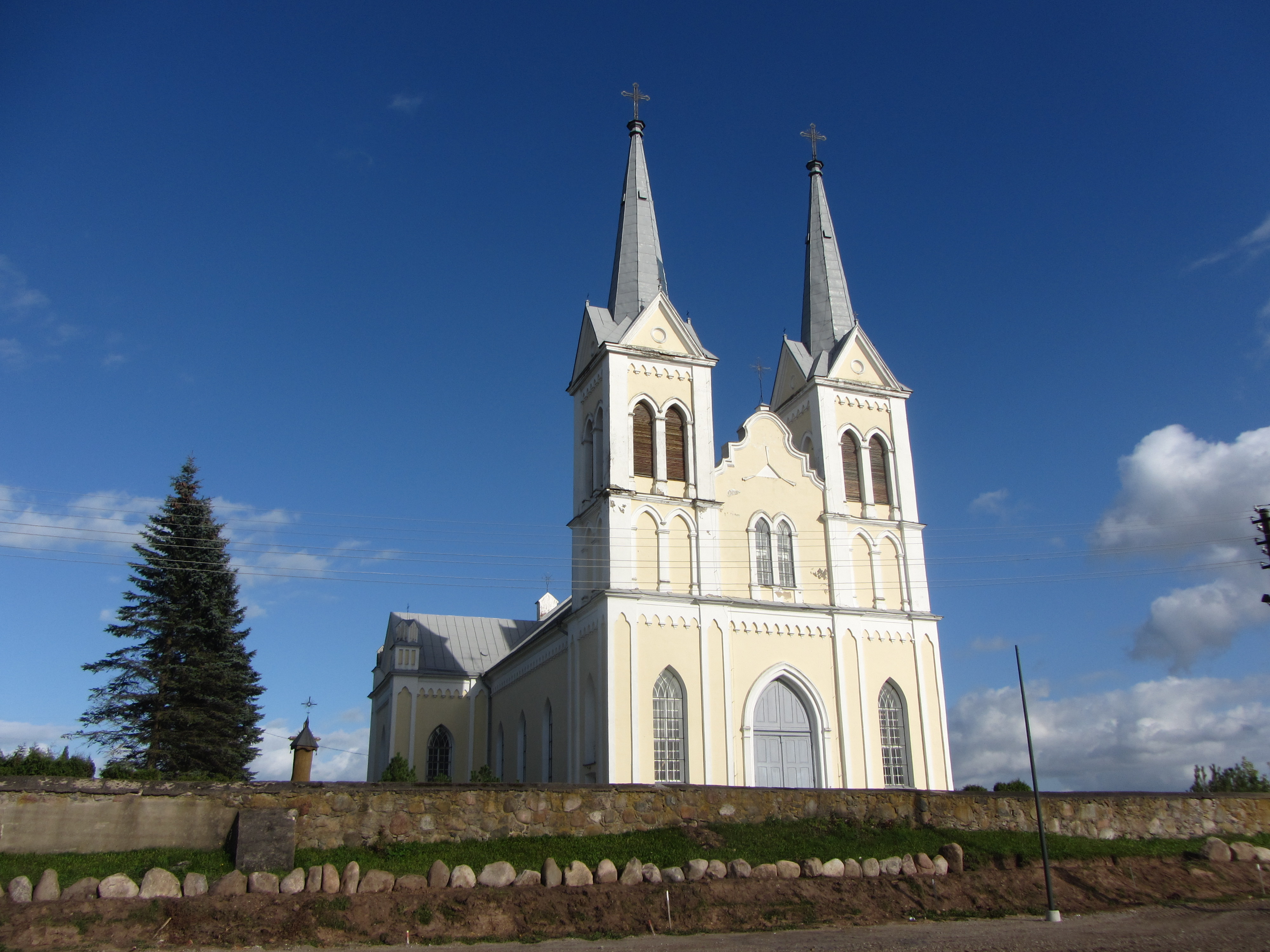 Obeliai, Lithuania